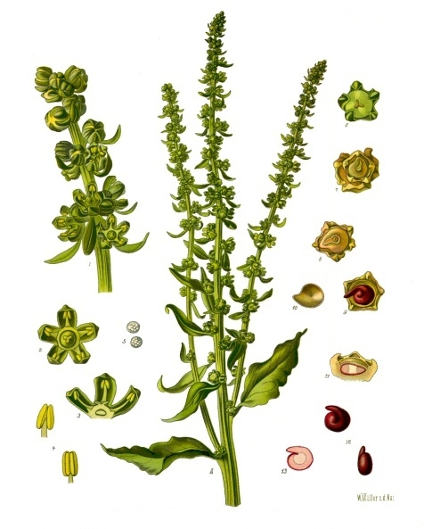 Runkelrübe. A oberer Theil der blühenden Pflanze in natürl. Grösse; 1 Theil der Blüthenähre, vergrössert; 2 Blüthe von oben, desgl.; 3 dieselbe im Längsschnitt, desgl.; 4 Staubgefäss, desgl.; 5 Pollen, desgl.; 6 junge Frucht, desgl.; 7, 8, 9 reife Frucht, desgl.; 10 dieselbe im Querschnitt ohne Perigon; 11 desgl. mit Perigon; 12 Same von verschiedenen Seiten, desgl.; 13 derselbe zerschnitten.